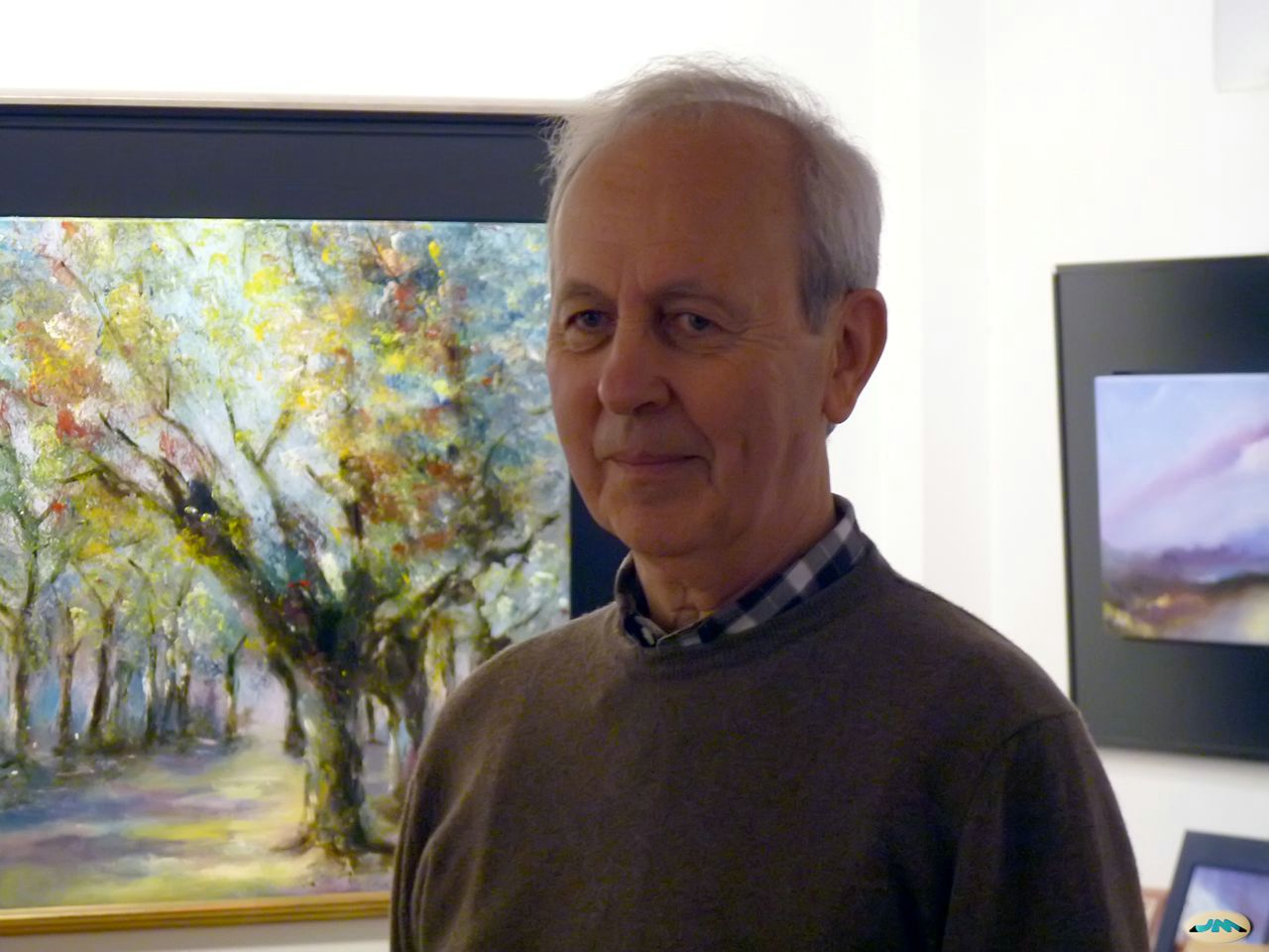 Tener un amigo así, enriquece...Gracias, Alex